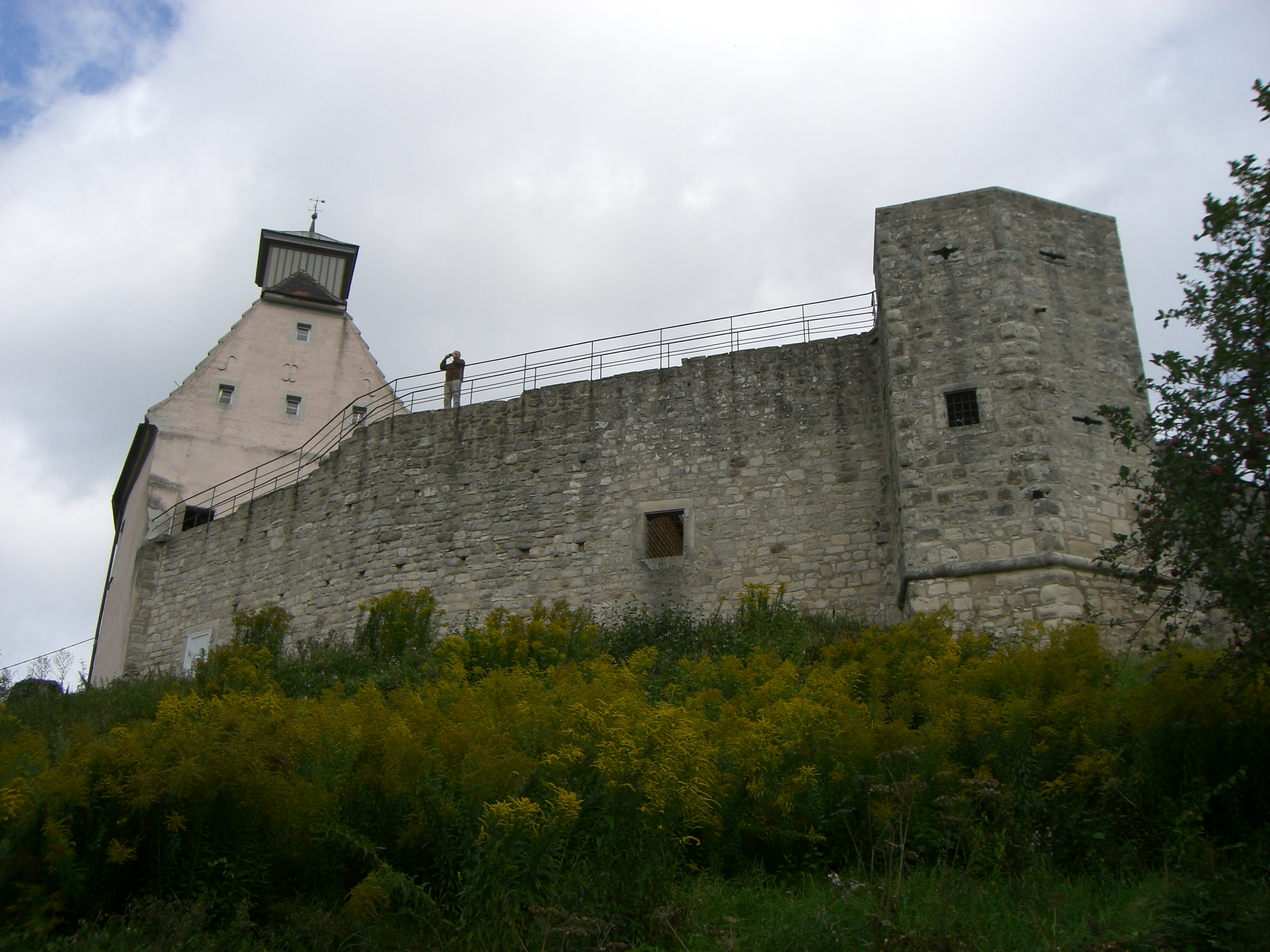 Schloss Ebersberg